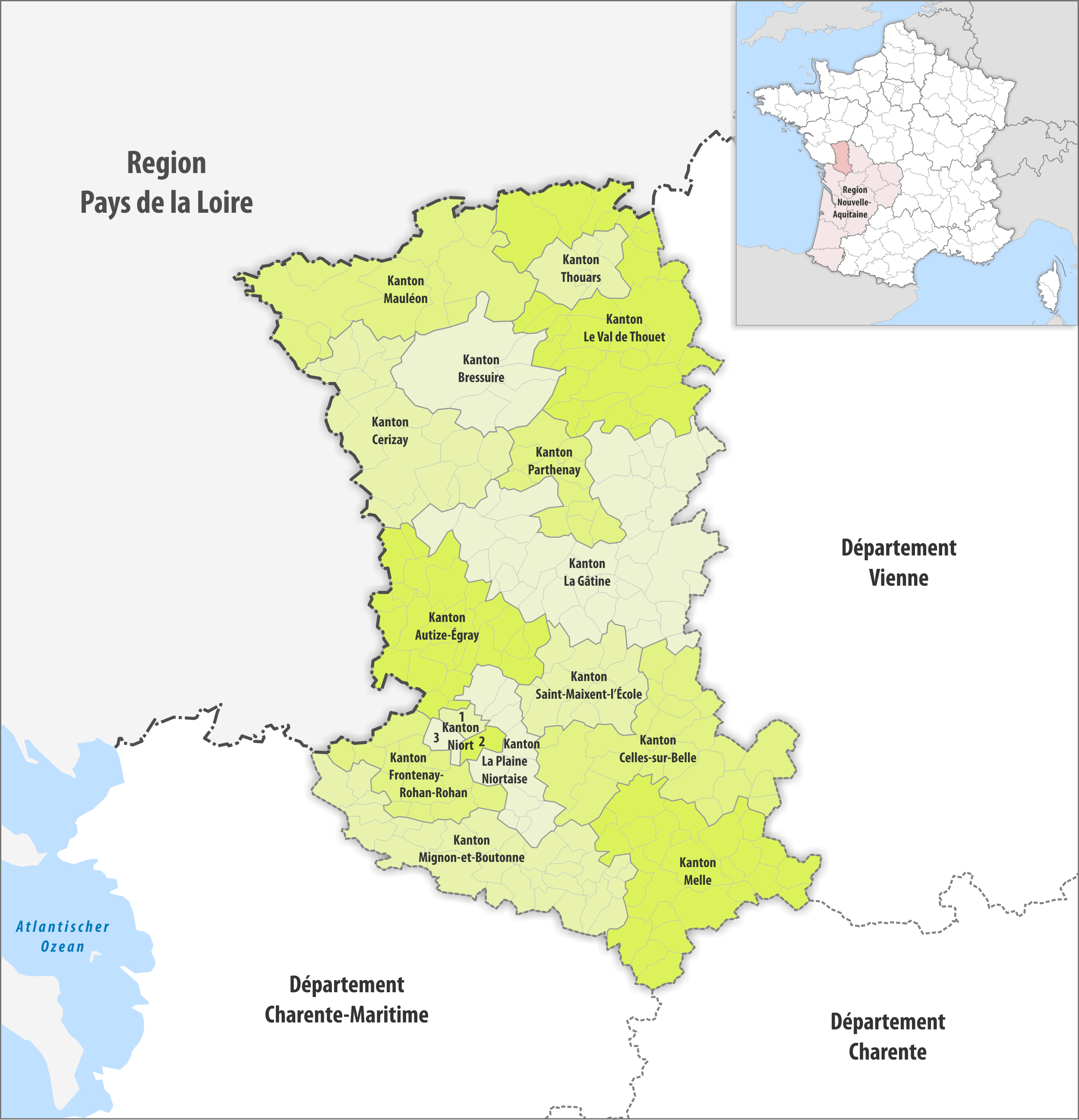 Gemeinden und Kantone im Departement Deux-Sèvres